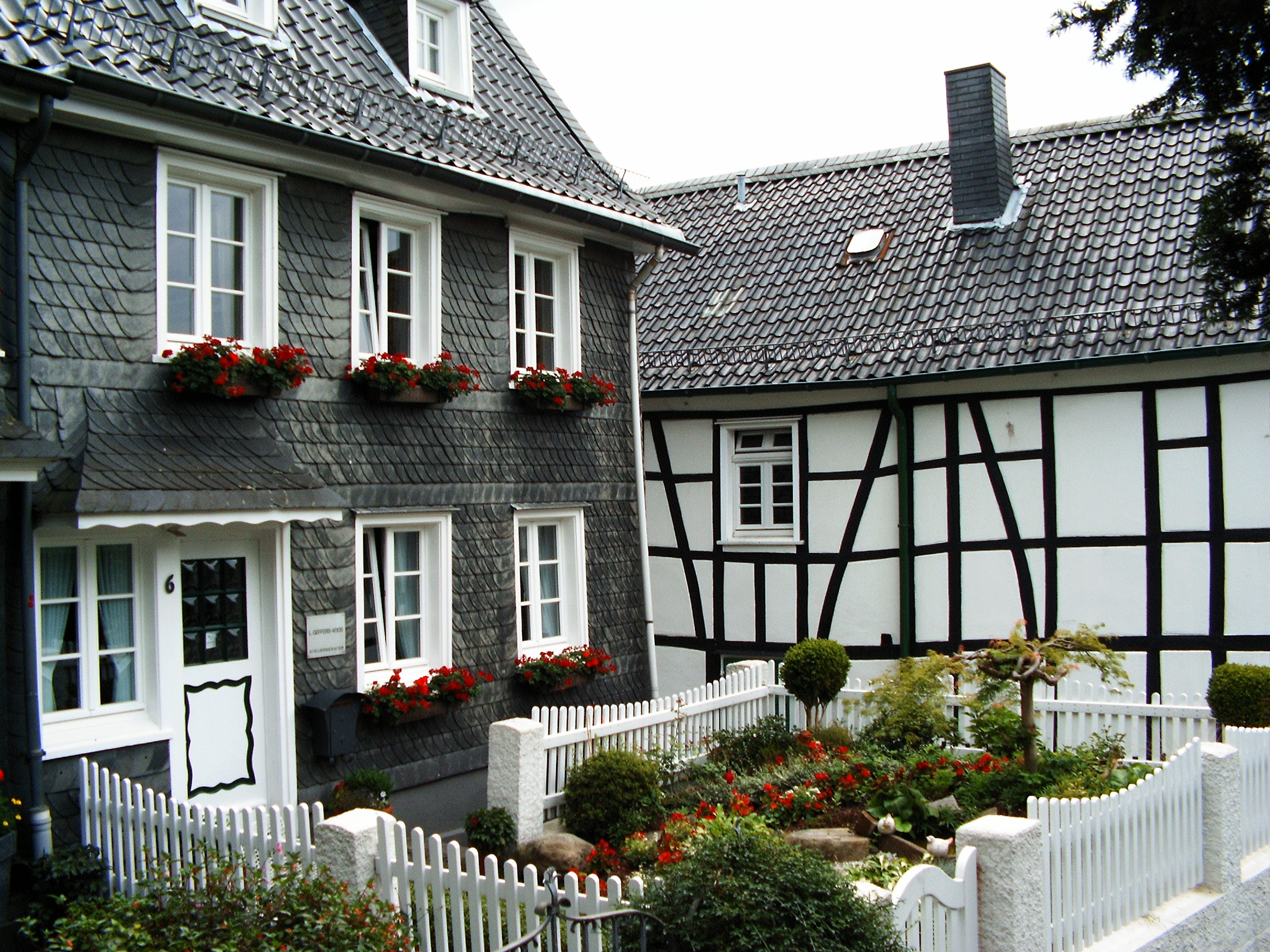 Häuser oberhalb des Gräfrather Marktes